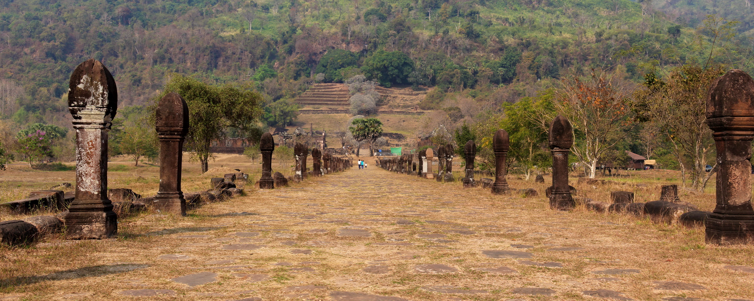 Wat Poo, Champasak, Laos ຜາສາດຫີນວັດພູ, ຈຳປາສັກ, ປະເທດລາວ